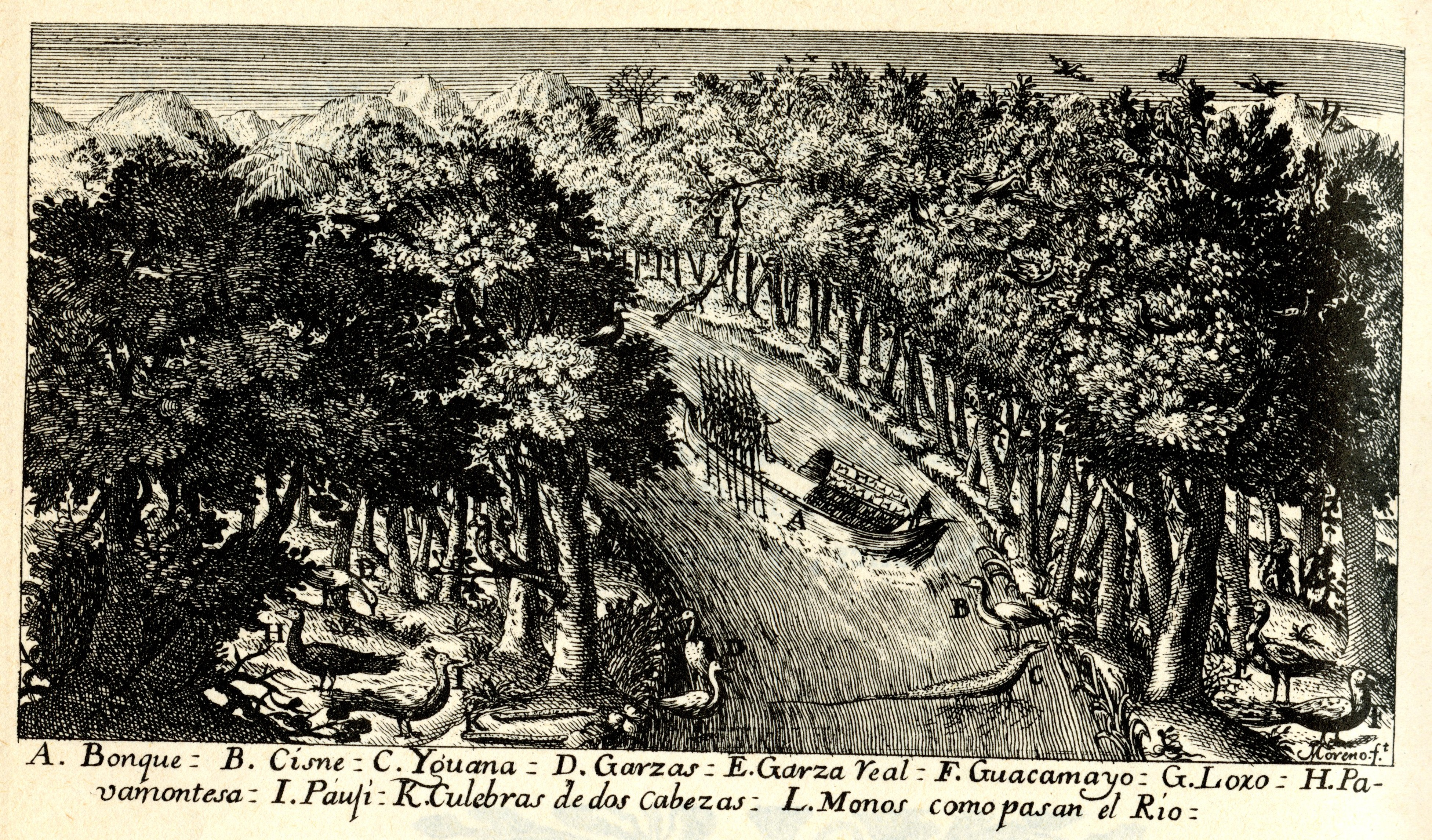 De Ulloa, Antonio y Jorge Juan. Relación Histórica del Viaje a la América Meridional, hecho de Orden de Su Majestad Católica para medir algunos Grados de Meridiano Terrestre, y venir por ellos en conocimiento de la verdadera Figura y Magnitud de la Tierra, con otras varias Observaciones Astronómicas y Físicas. Por Don Jorge Juan Comendador de Aliaga, en la Orden de San Juan, Socio correspondiente de la Real Academia de las Ciencias de París; y Don Antonio de Ulloa de la Real Sociedad de Londres: ambos por Capitanes de Fragata de la Real Armada. Primera Parte / Tomo I. Impresa por la Orden del Rey Nuestro Señor en Madrid por Antonio Marín, Año de MCDDXLVIII (1748). Diapositiva de Consulta y acceso publico cuya información fue investigada de un libro y/o ejemplar de revisión custodiado en los Fondos Bibliográficos (Sección Siglo XVIII o Etapa Colonial) del Archivo Histórico del Guayas; Guayaquil, Ecuador